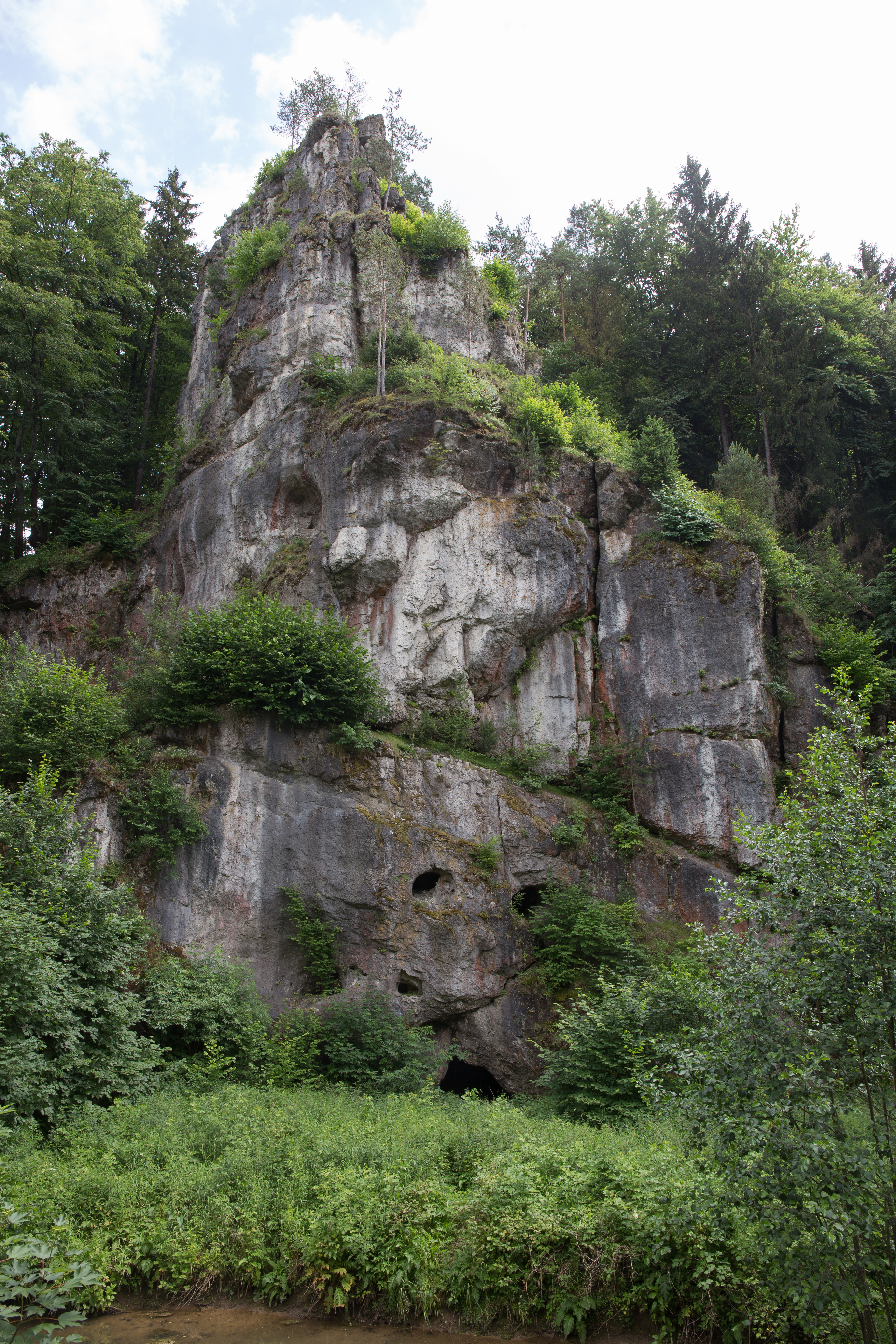 Ansicht des Löwenfelsens im Pegnitztal, unten der Eingang der Löwenfels-Quellgrotte (A 21)